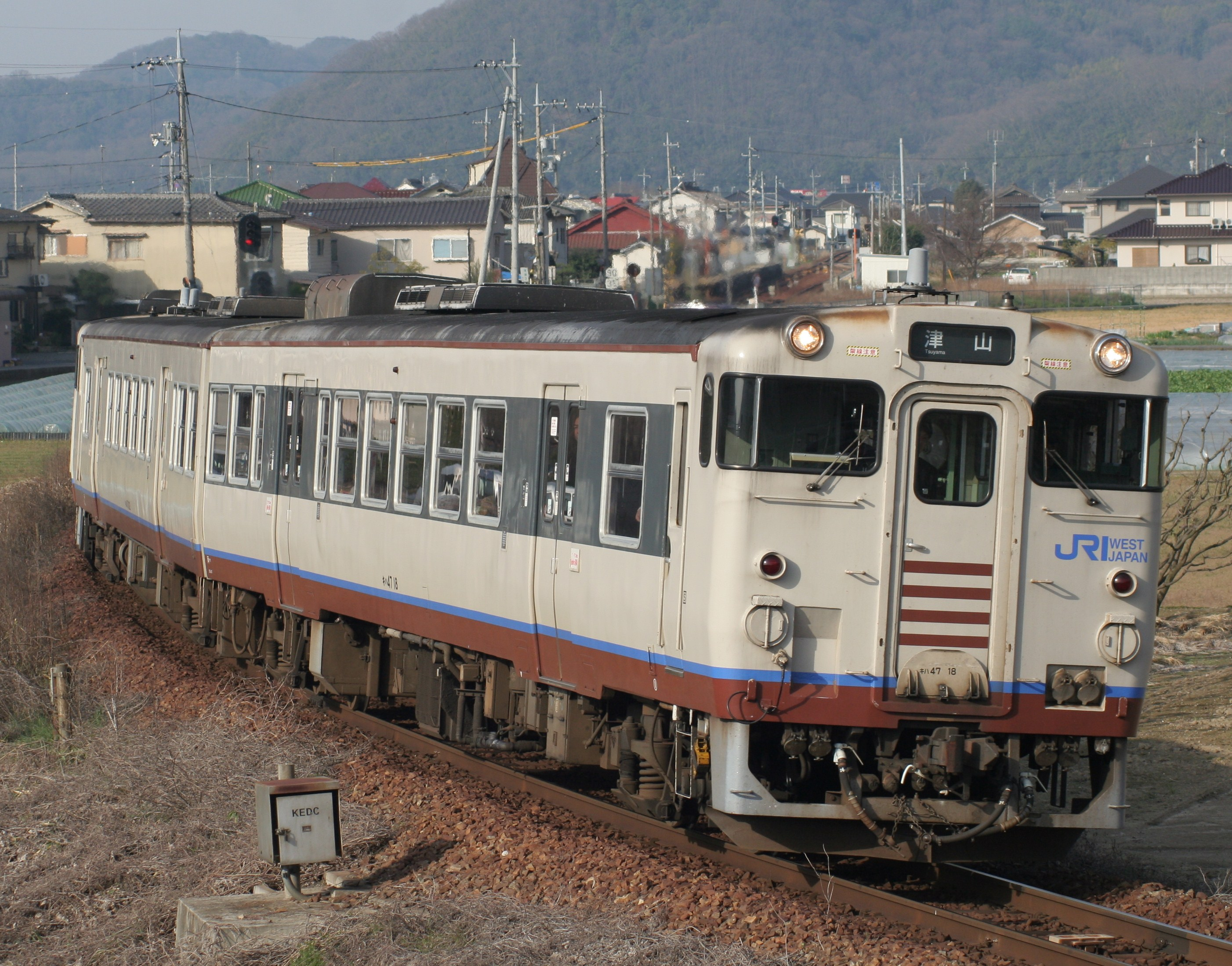 JR西日本キハ40系気動車キハ47-18 津山線、玉柏 - 牧山